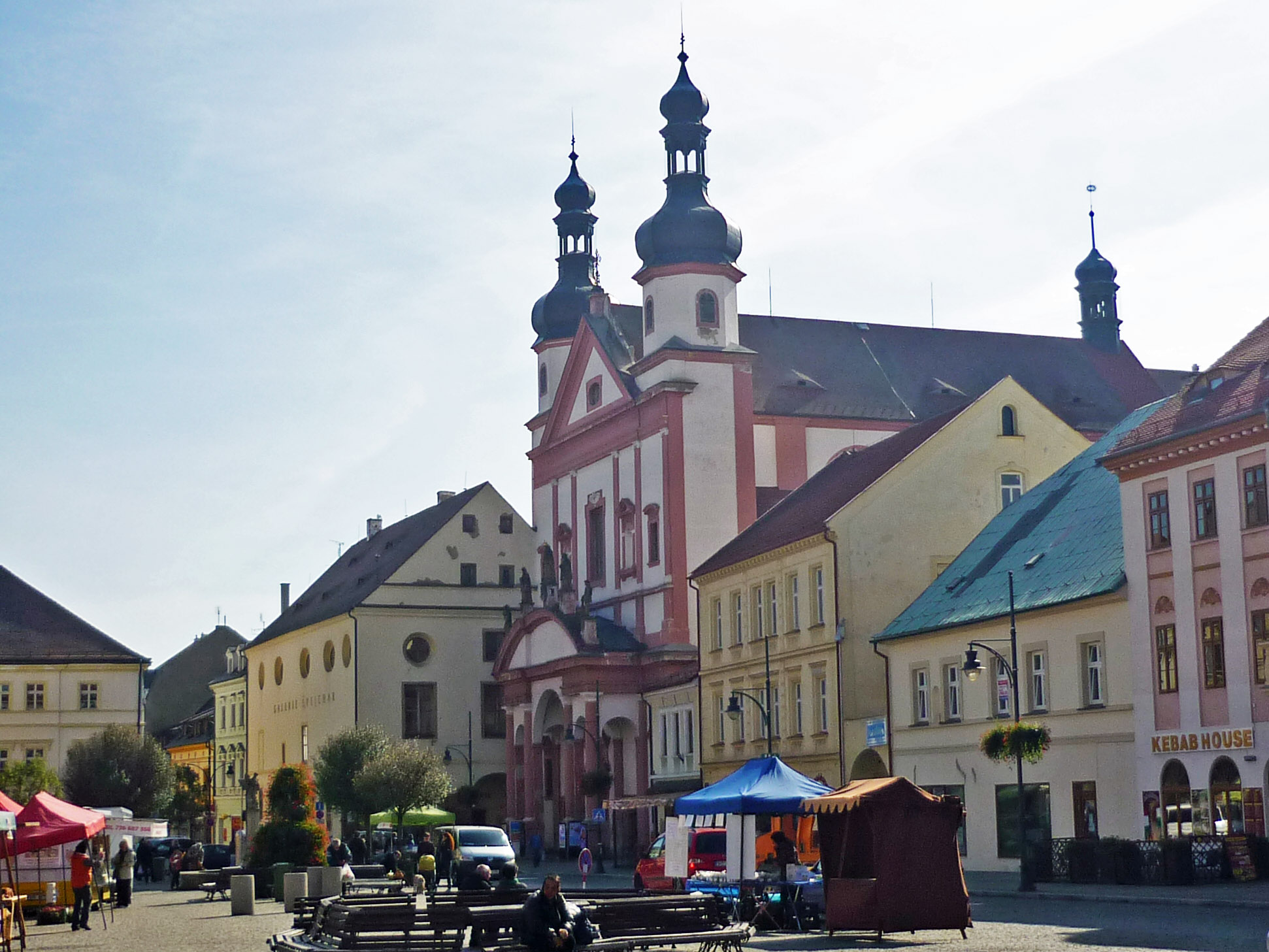 Ring mit St. Ignatiuskirche (Jesuitenkirche) in Komotau (Chomutov)